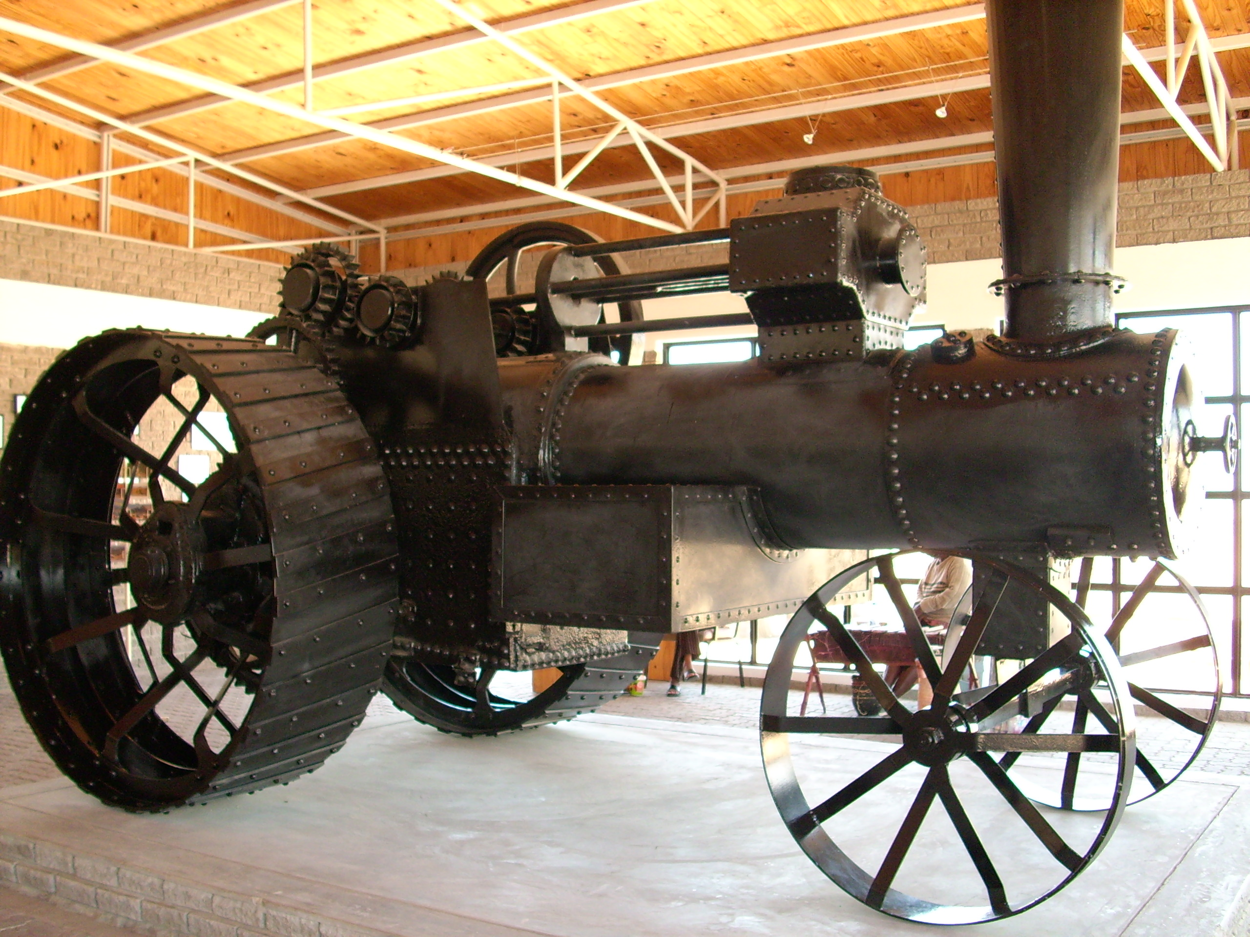 Dampflokomobil Martin Luther, Namibia